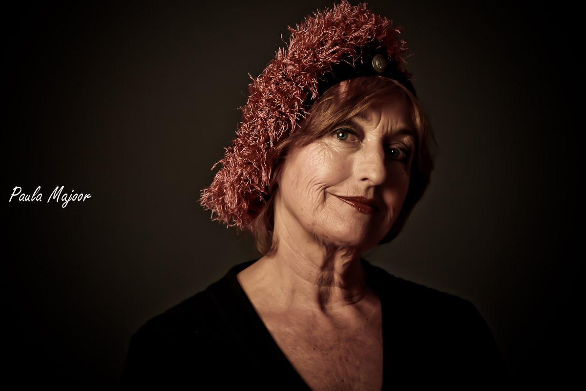 Portretfoto gemaakt door Ger Adrichem